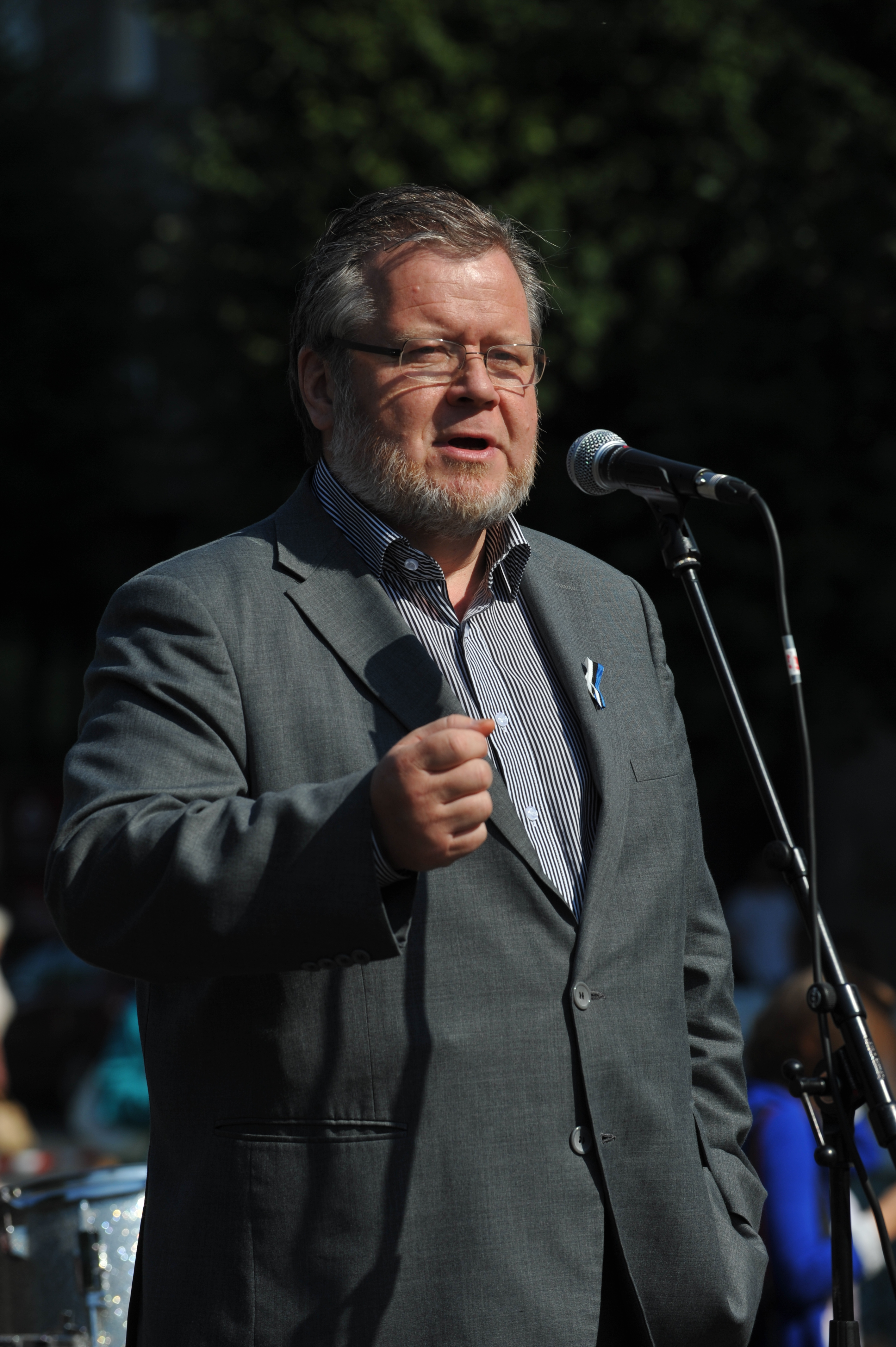 Islandi välisminister Össur Skarphéðinsson avamas toiduturgu Islandi väljakul